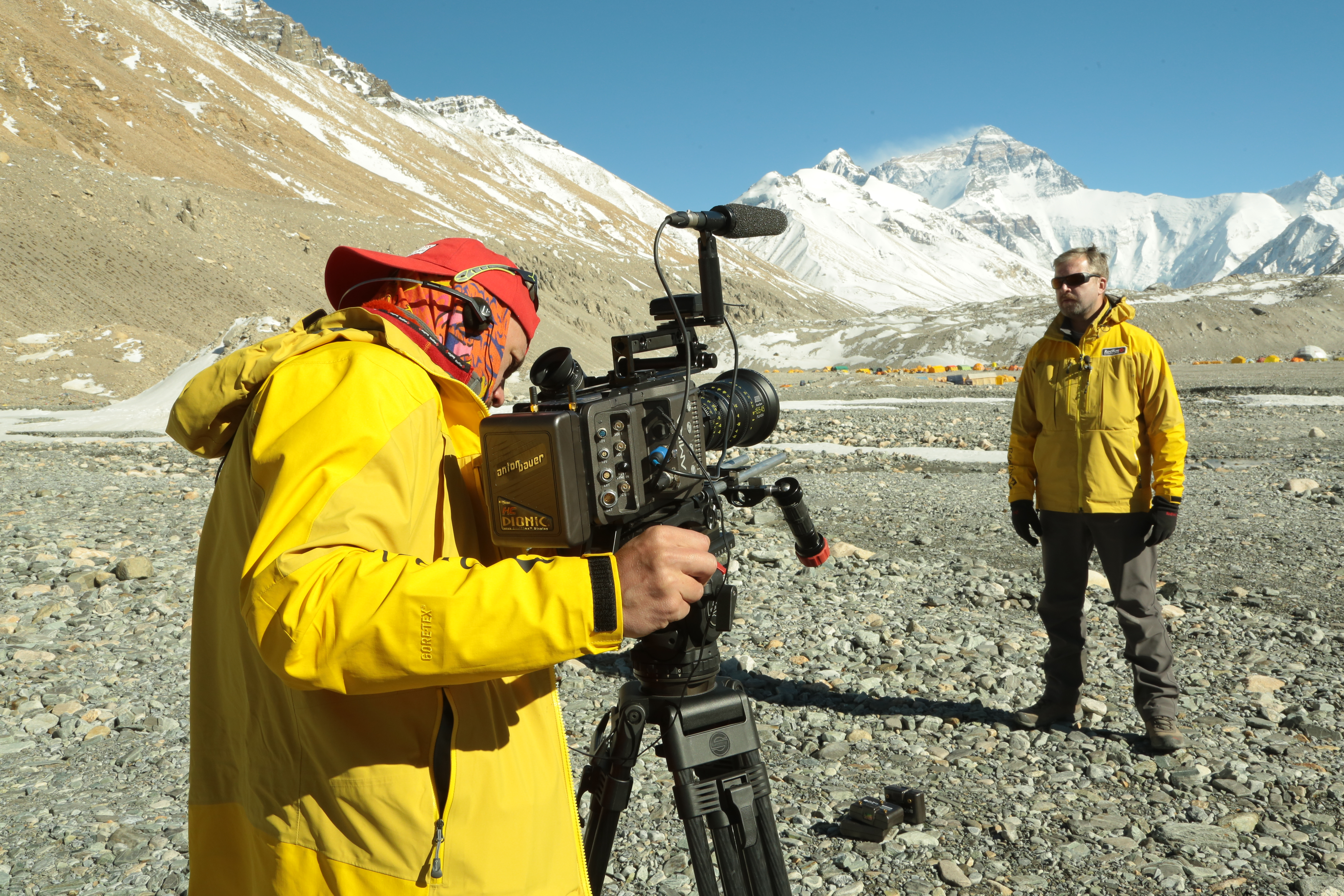 Съемки фильма "Ген высоты, или как пройти на Эверест"